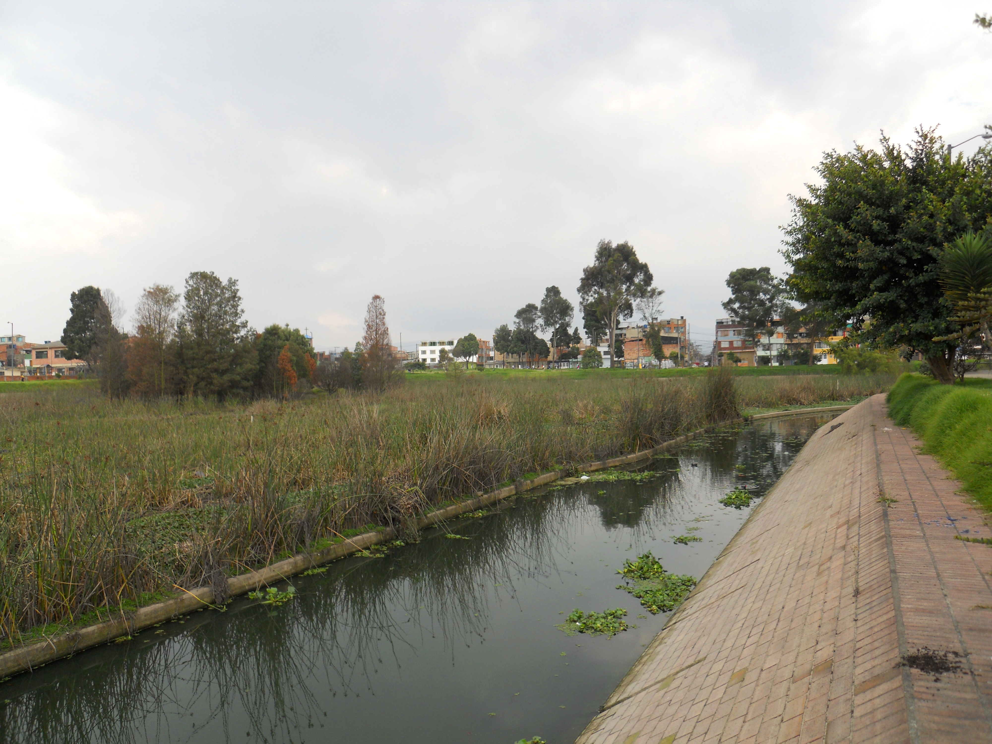 Humedal de El Jaboque en el barrio Bolivia de la localidad de Engativá, hacia la carrera 111 a con calle 71, al occidente de Bogotá.